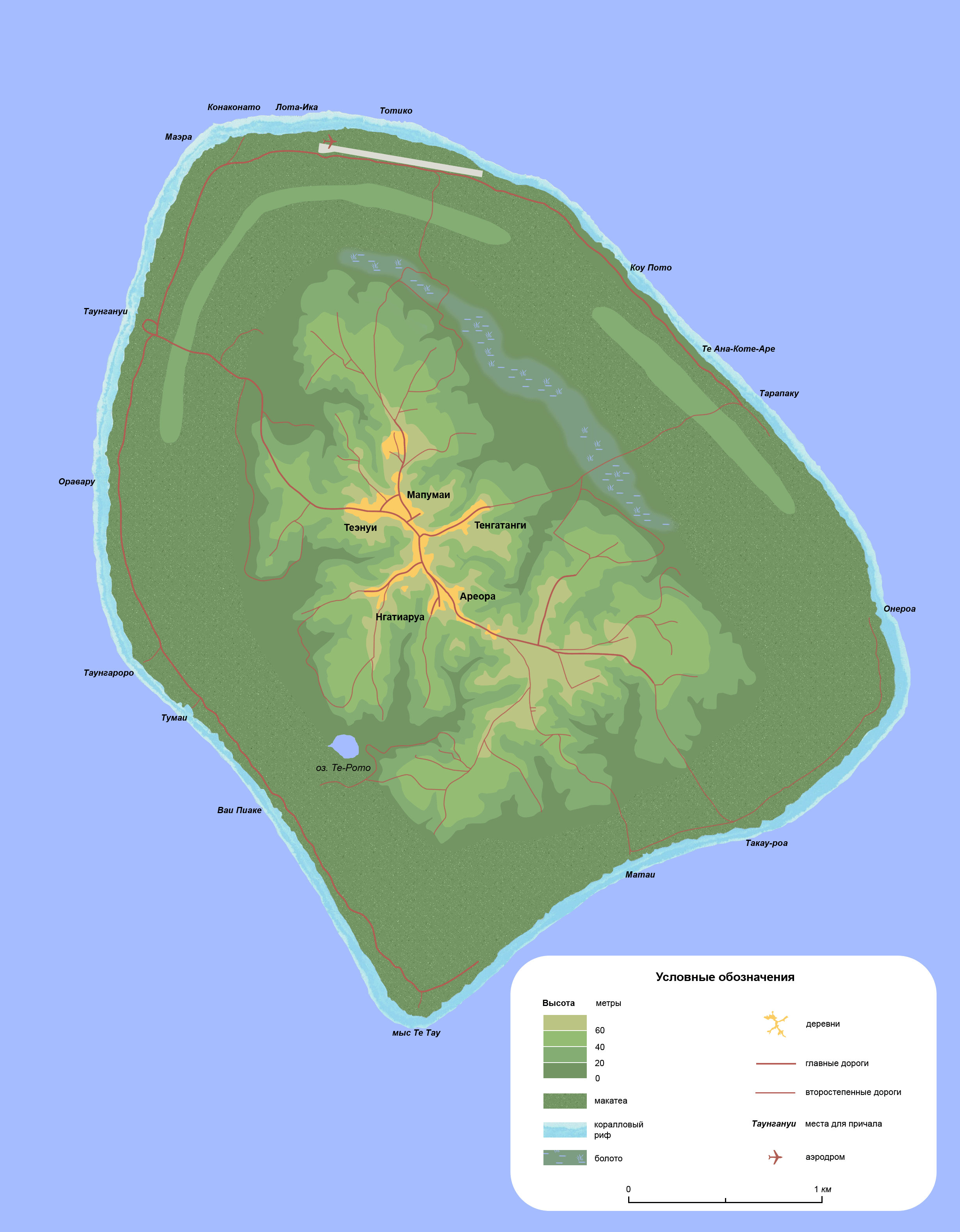 Atiu map (rus)